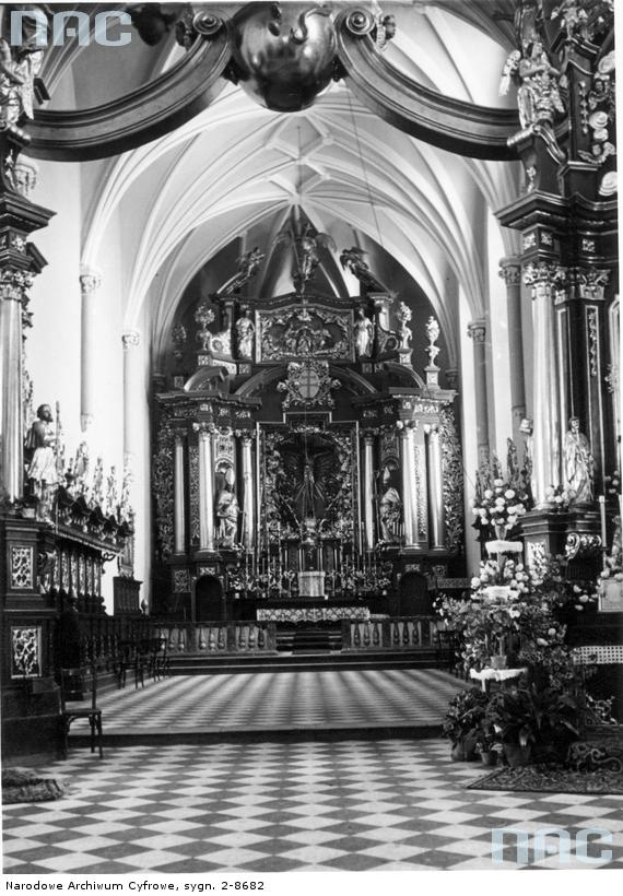 Wnętrze Bazyliki Kolegiackiej pw. Ducha Świętego w Przeworsku - fot. archiwalna